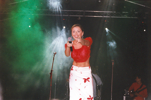 Анжелика Варум на концерте в Тель-Авиве, 2003 год. Снимал сам.